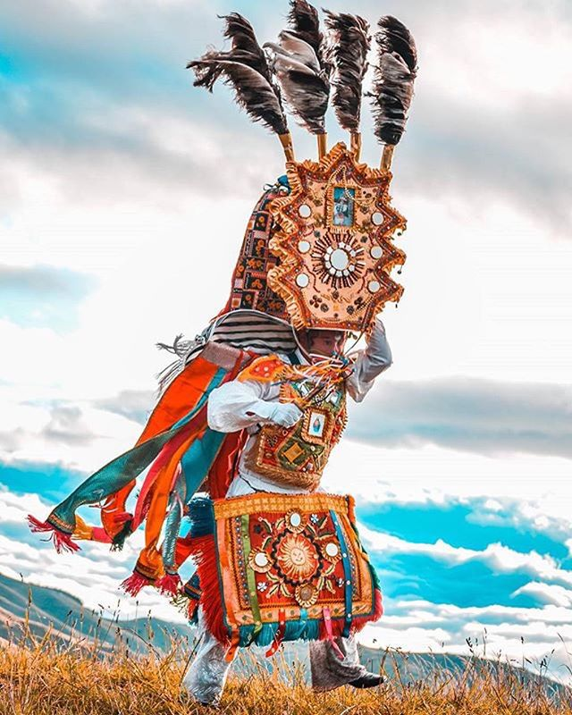 Danzante, personaje principal de la festividad de Corpus Cristi